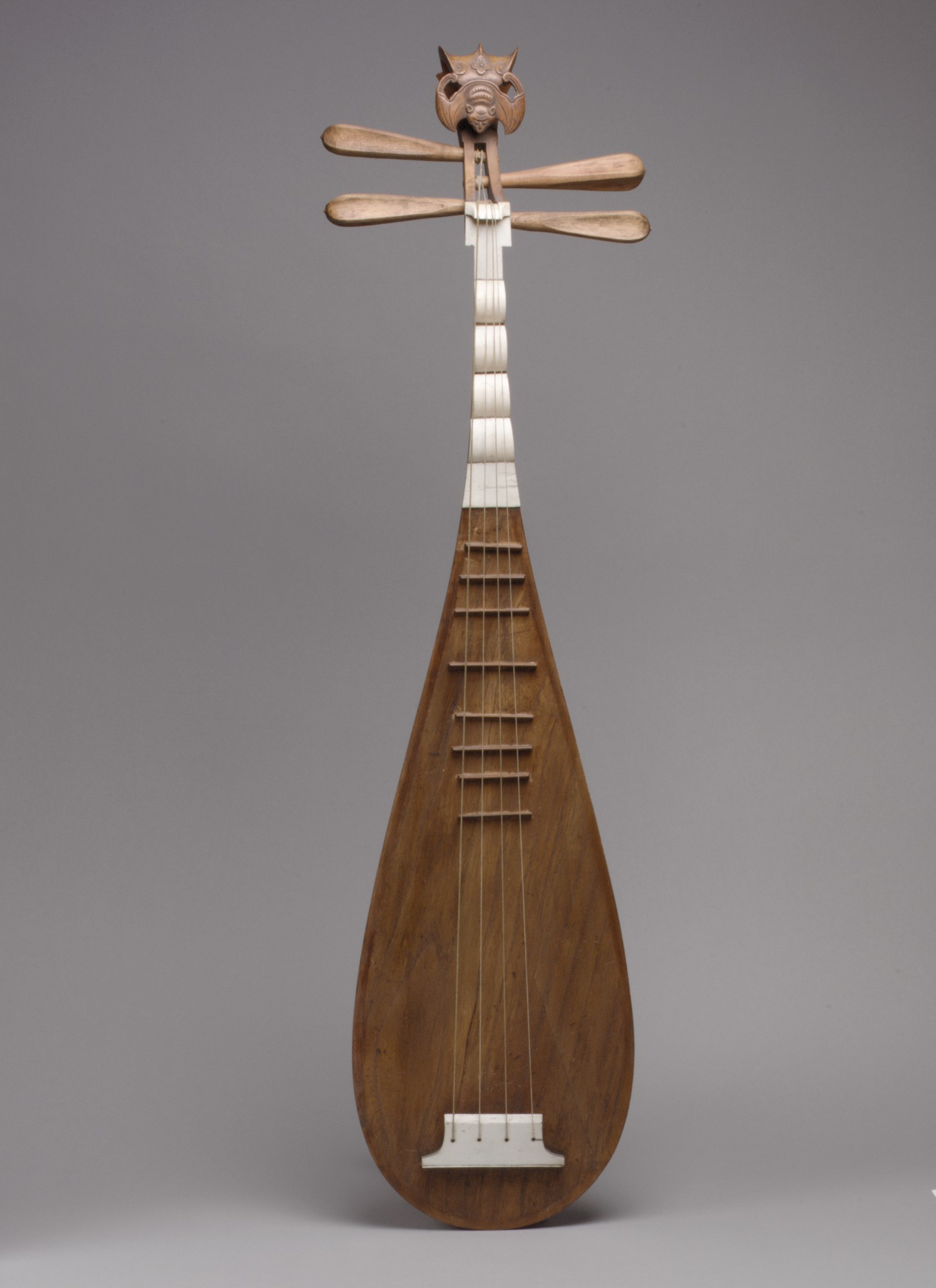 pipa; Chinese